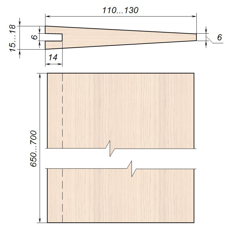 Гонтина (размеры)